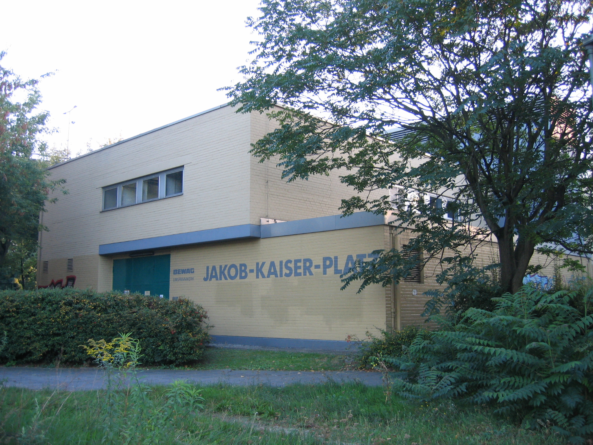 Bewag-Umspannwerk (110 kV), Jakob-Kaiser-Platz, Berlin